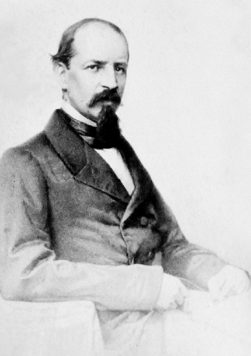 José Miguel Carrera Fontecilla, (Paraná, Río de la Plata; 1821 - Lima, Perú; 9 de septiembre de 1860). Político y militar chileno. Fue el hijo del político, militar, jefe de gobierno, general en jefe del Ejército y prócer de Chile José Miguel Carrera Verdugo y de Mercedes Fontecilla Valdivieso.